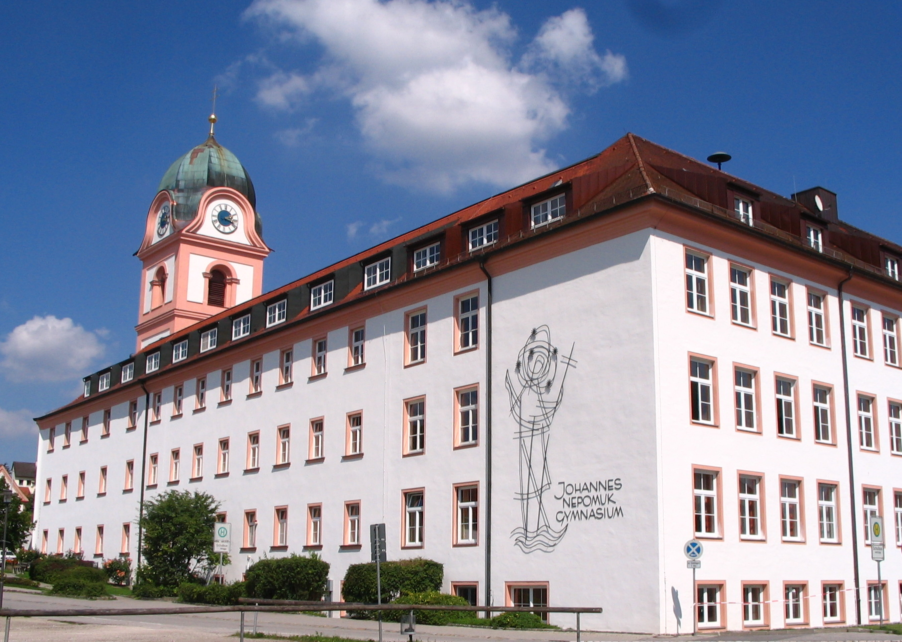 Johannes-Nepomuk-Gymnasium in Rohr, Landkreis Kelheim, Niederbayern